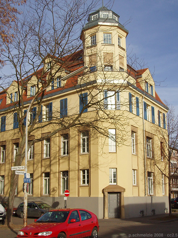 Denkmalgeschützter Hauptbau der Lebensmittelfabrik Otto & Kaiser in der Happelstraße 59 in Heilbronn, heute Gewerbenutzung